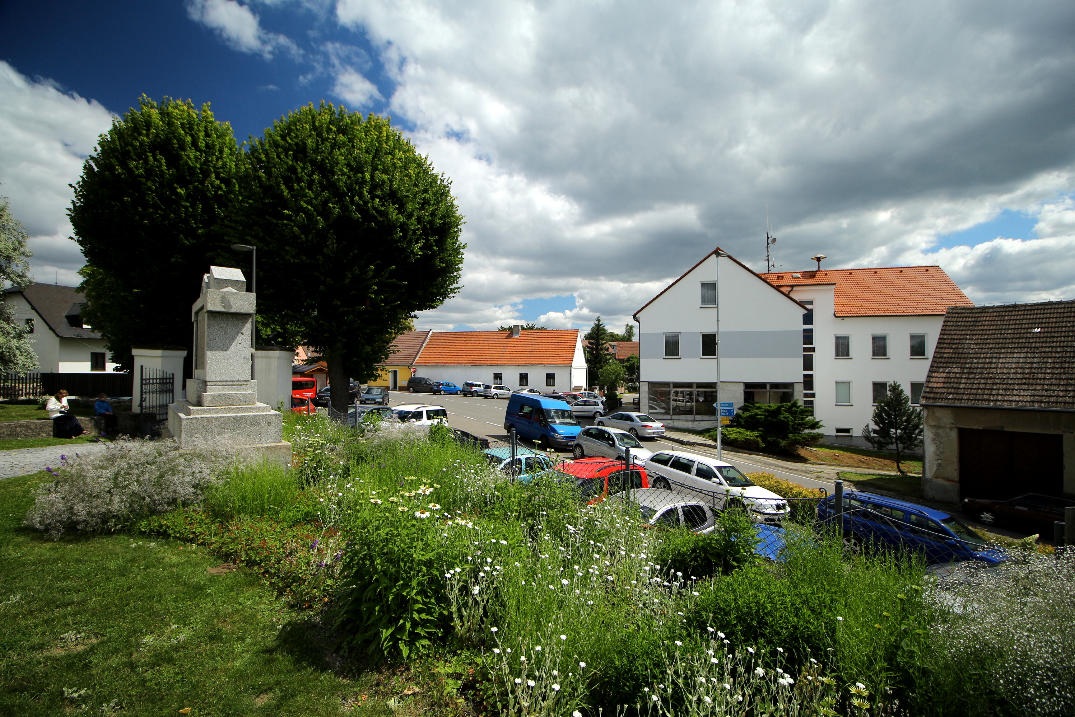 Chyšky